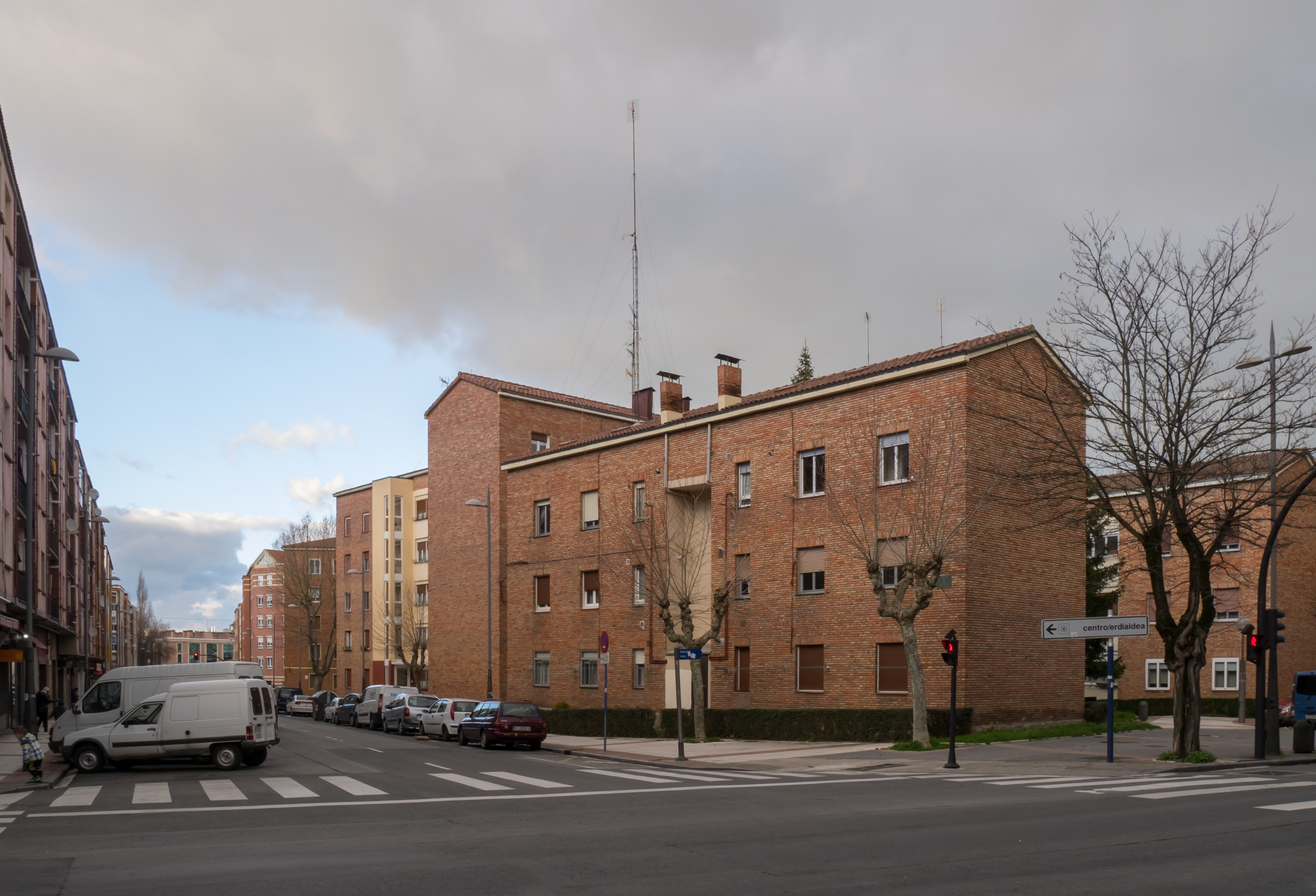 Calle Adurza en el Barrio de Adurza. Vitora-Gasteiz, Álava, País Vasco, España